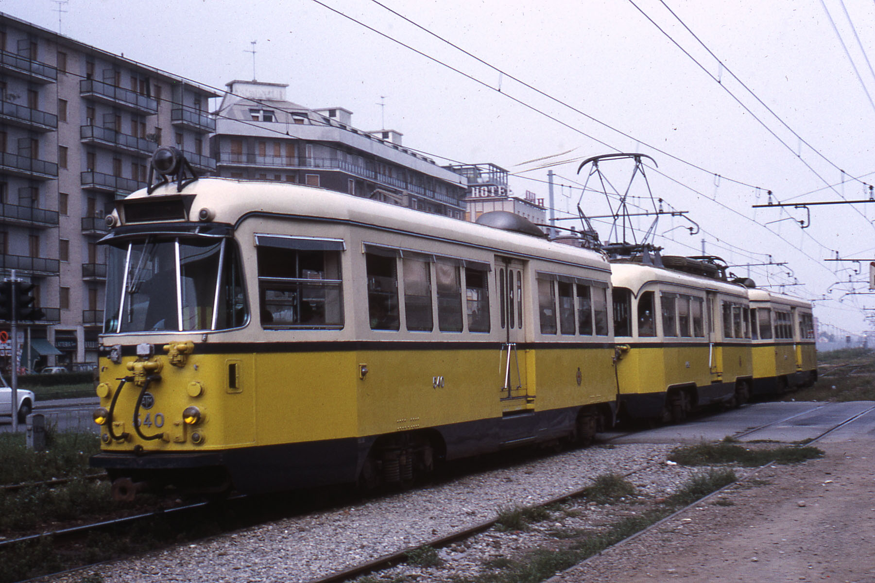 Treno bloccato serie 500 dell'ATM di Milano in corsa lungo via Palmanova.